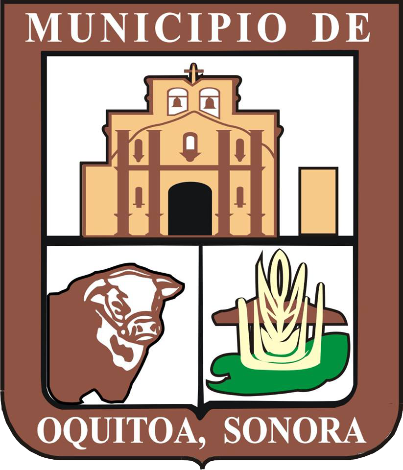 Escudo de armas oficial del municipio de Oquitoa. Diseñado por el ayuntamiento en turno de 2015-2018